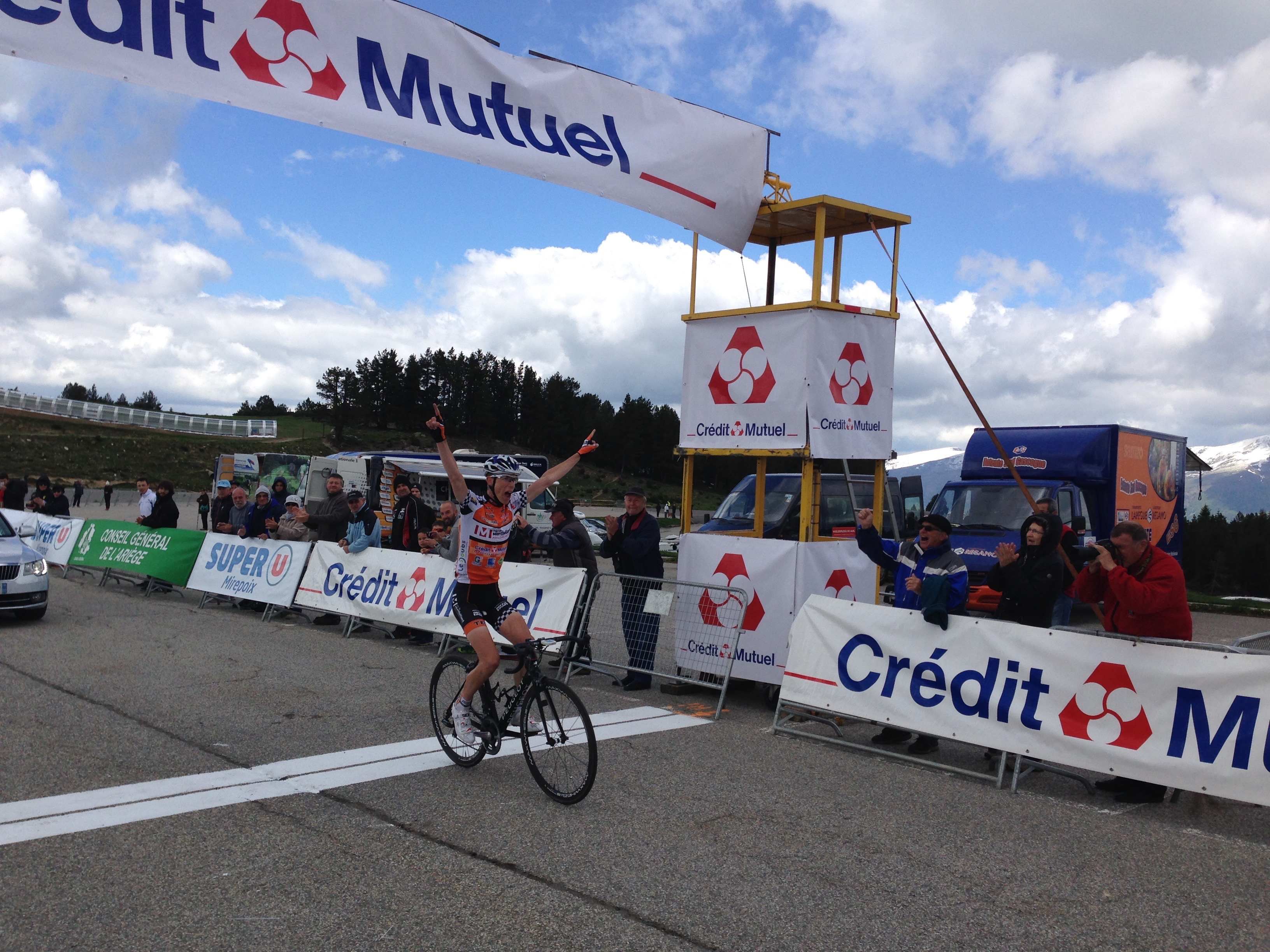 Jérémy MAISON (CC Etupes)